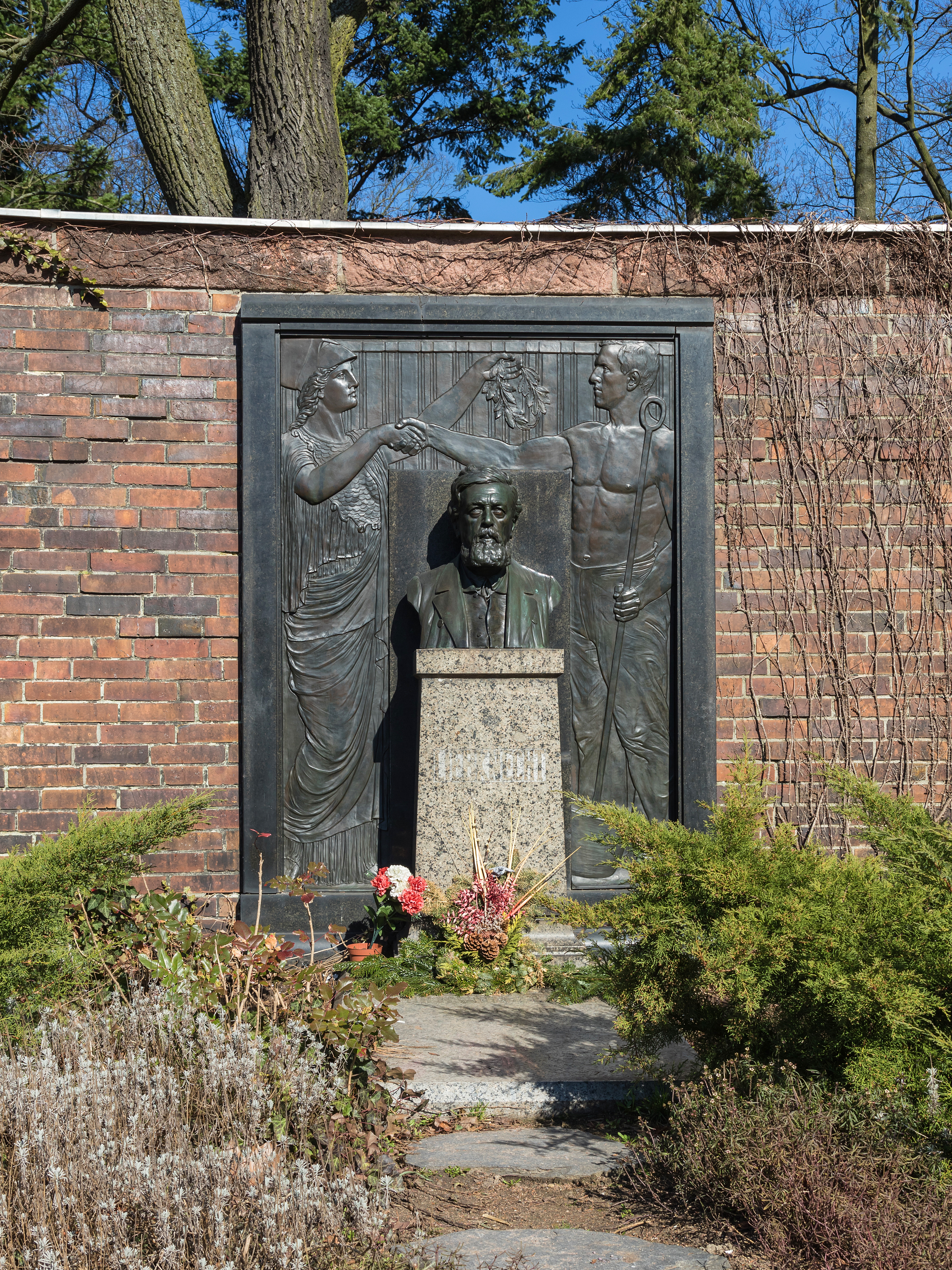 Zentralfriedhof Friedrichsfelde, Berlin-Lichtenberg. Gedenkstätte der Sozialisten, Grab von Wilhelm Liebknecht.